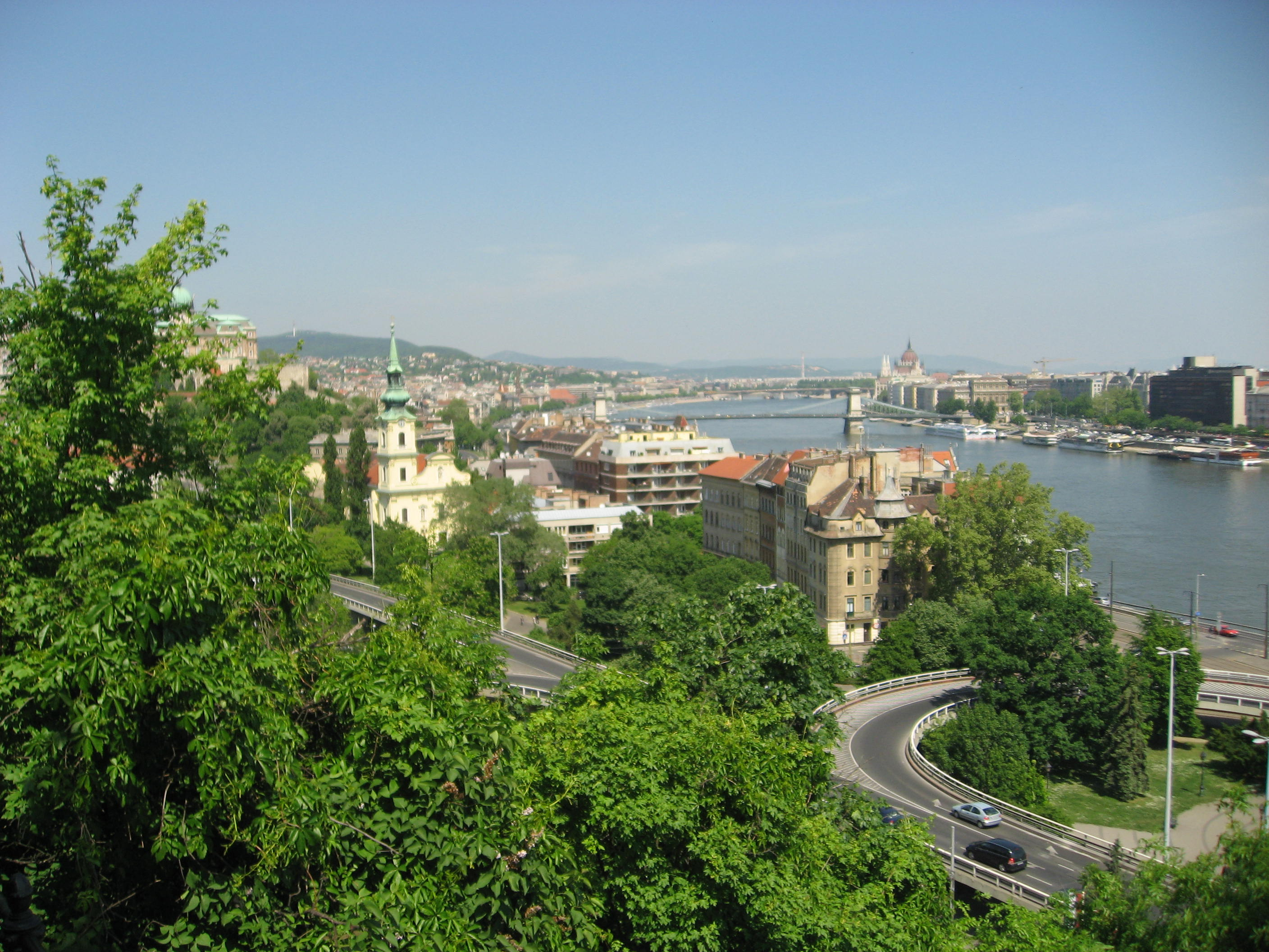 Budapešť